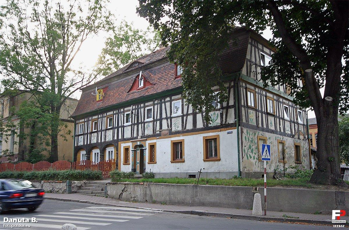 To bardzo często fotografowany budynek. Parter częściowo murowany, częściowo drewniany w konstrukcji przysłupowej. Piętro w konstrukcji ryglowej. Dach łamany z naczółkami. Zastanawiają mnie wyblakłe malowanki w polach między słupami piętra i na ścianie szczytowej - czy to naśladowanie starszych zdobień, czy współczesna inwencja mieszkańców? Zdjęcie z jadącego auta, inaczej się nie dało:(.